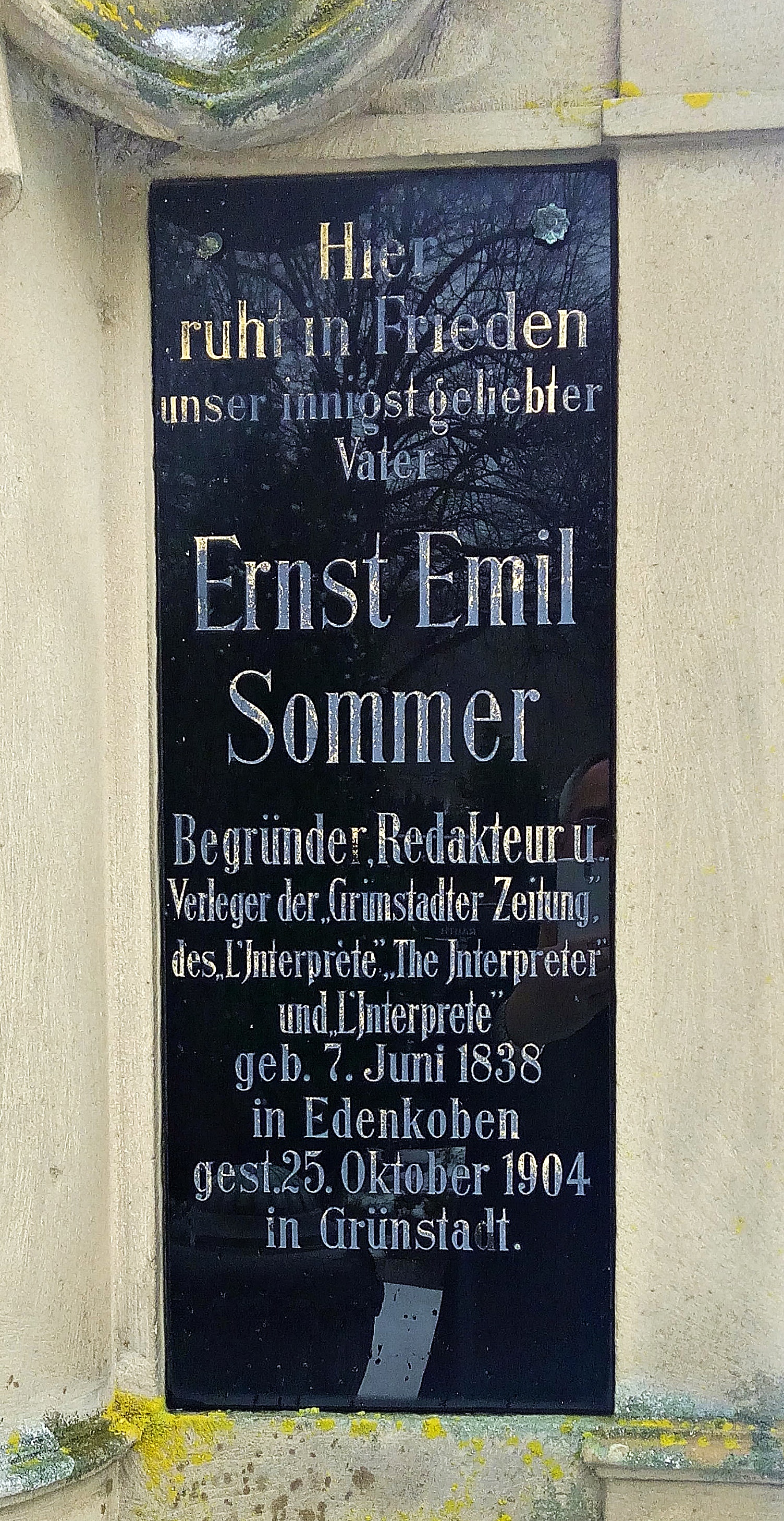 Emil Sommer (1838–1904), deutscher Verleger und Zeitungsredakteur, Grab in Grünstadt